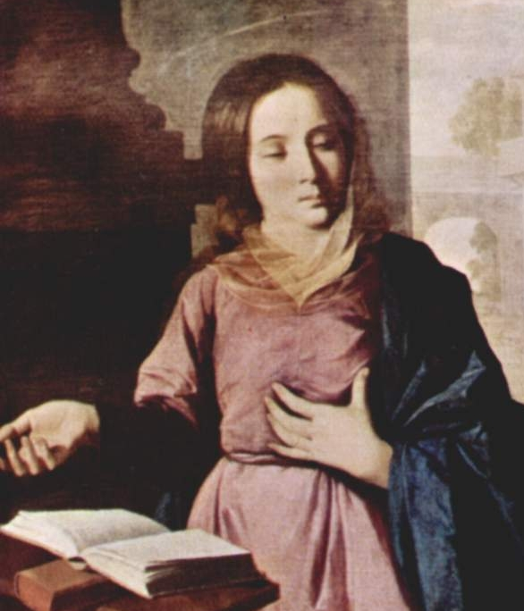 Hochaltar des Kartäuserkloster Nuestra Señora de la Defensión in Jerez de la Frontera